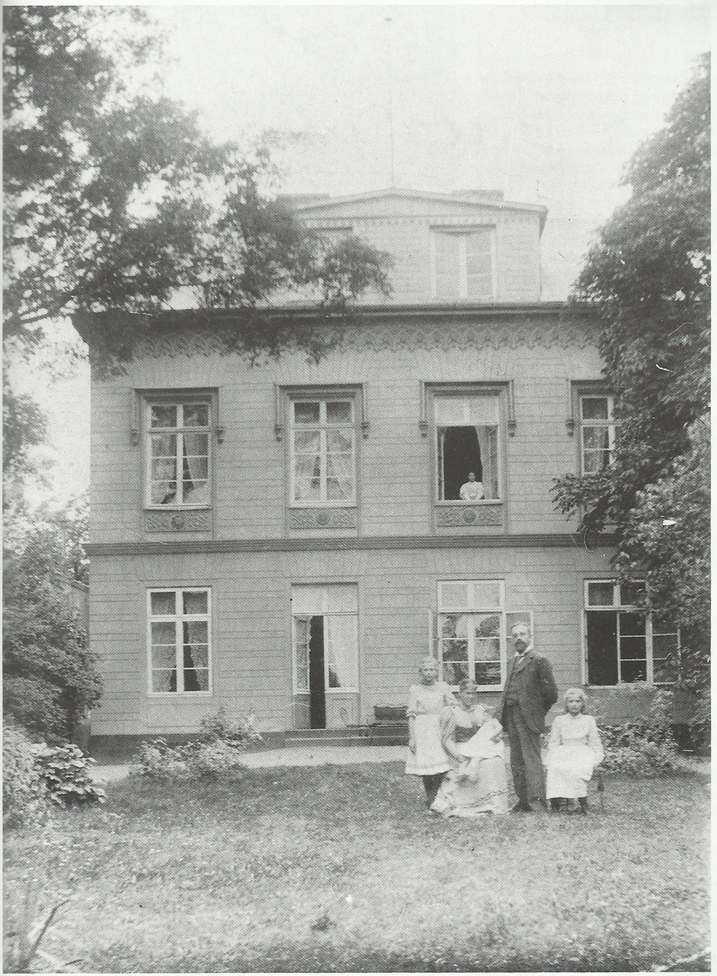 Villa Sell/Zitelmann in Bonn: Ansicht der Rheinfront (mit dem Ehepaar Zitelmann und drei Töchtern)